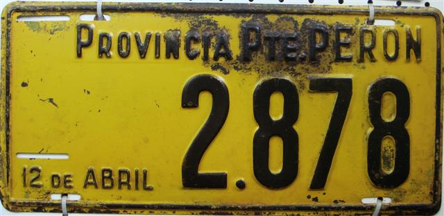 Antigua patente argentina de la Provincia de Presidente Perón, actual Provincia del Chaco.